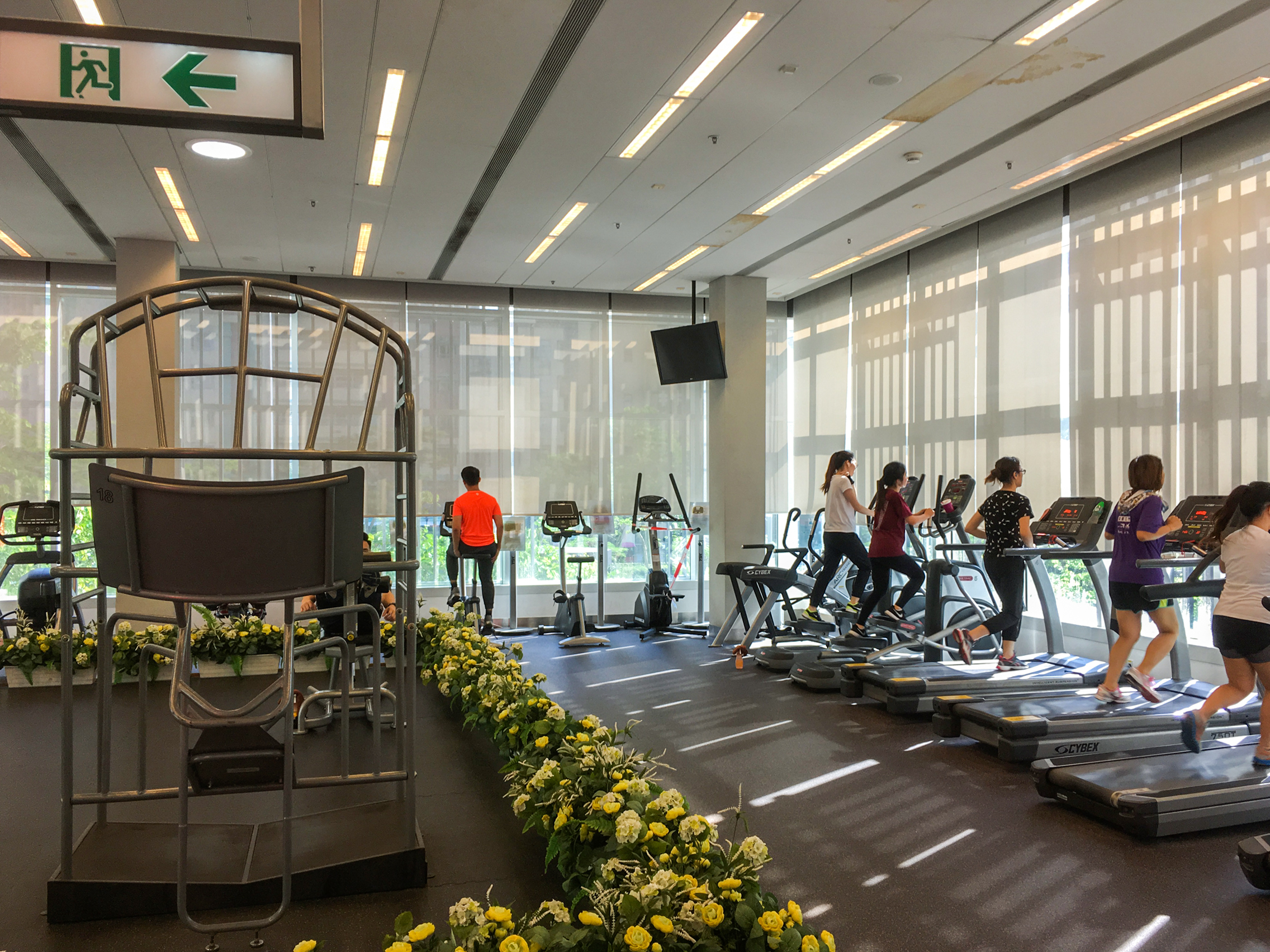 Hang Hau Sports Centre Gym Room